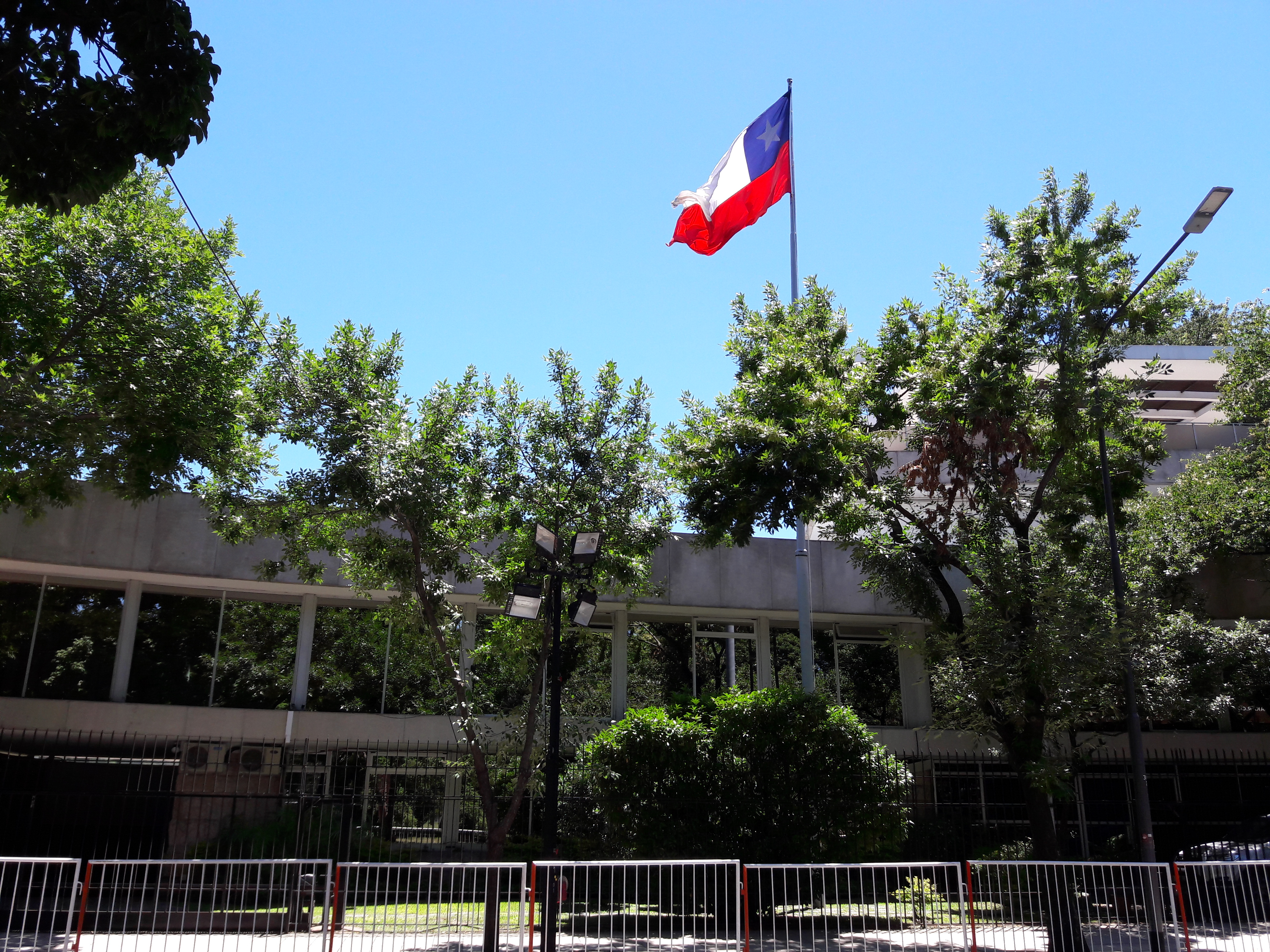 Embajada de Chile, Palermo, Buenos Aires, Argentina.